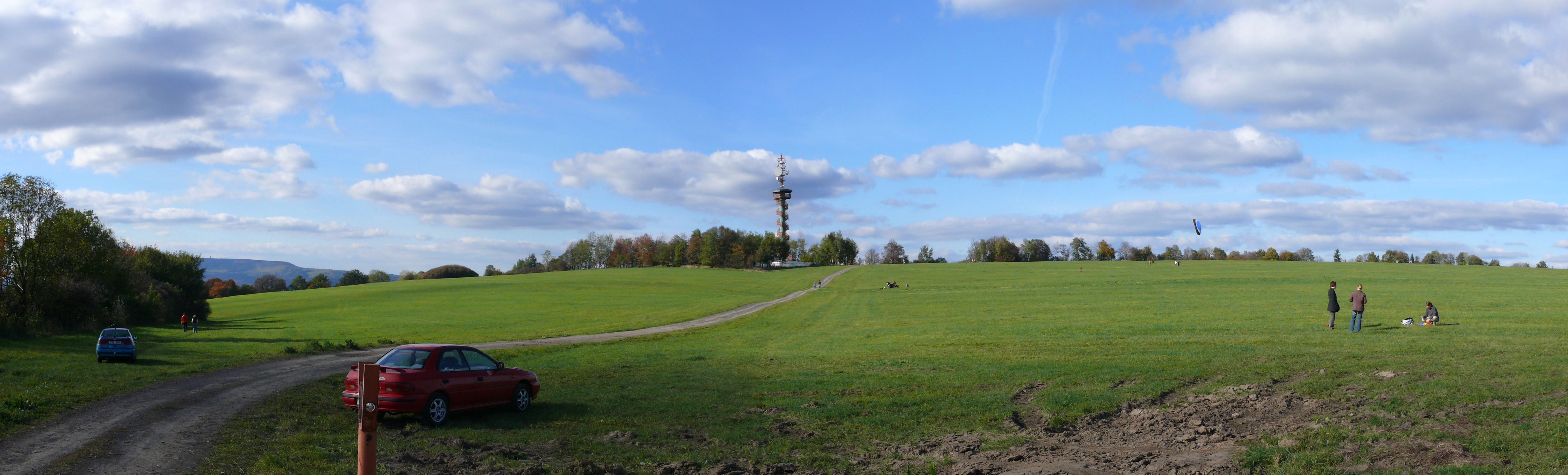 Sokolí vrch - rozhledna z louky